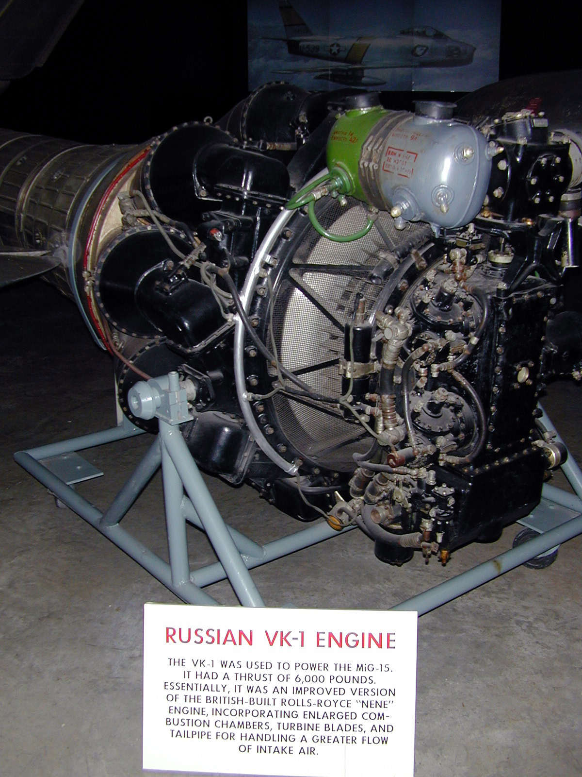 Klimov VK-1 Jet Engine